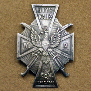 Odznaka Brygady Kaukaskiej